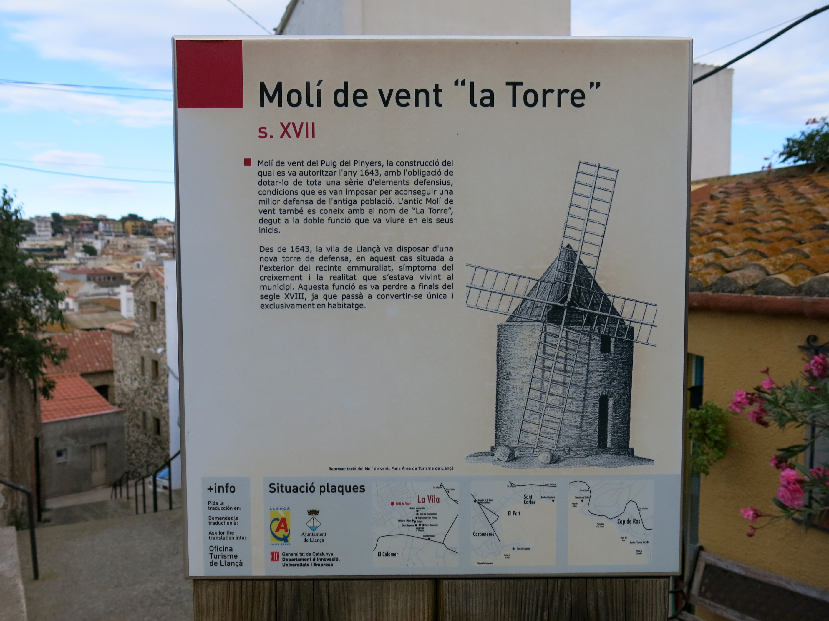 Torre de la plaça de la Torre (Llançà)